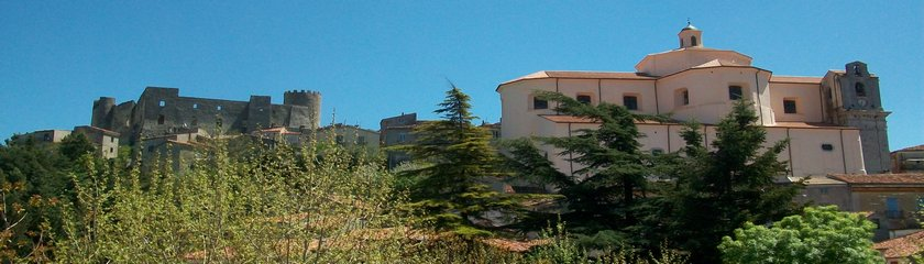 Panorama Moliterno